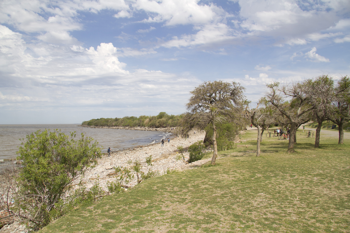 Reserv Ecológica